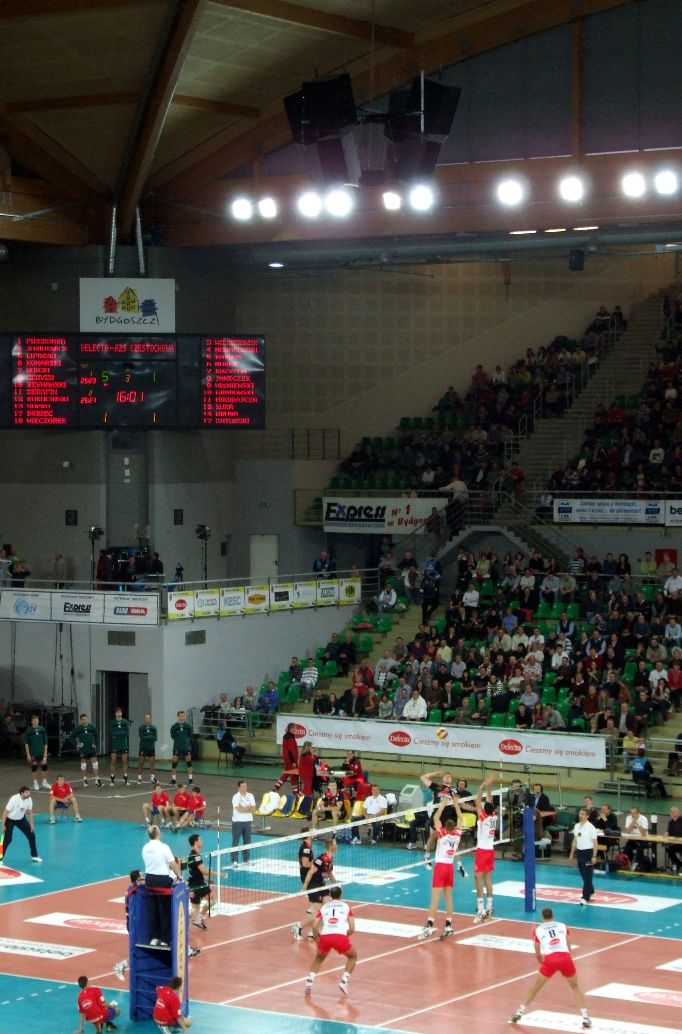 Mecz ligi siatkówki mężczyzn. Delecta Bydgoszcz - AZS Częstochowa